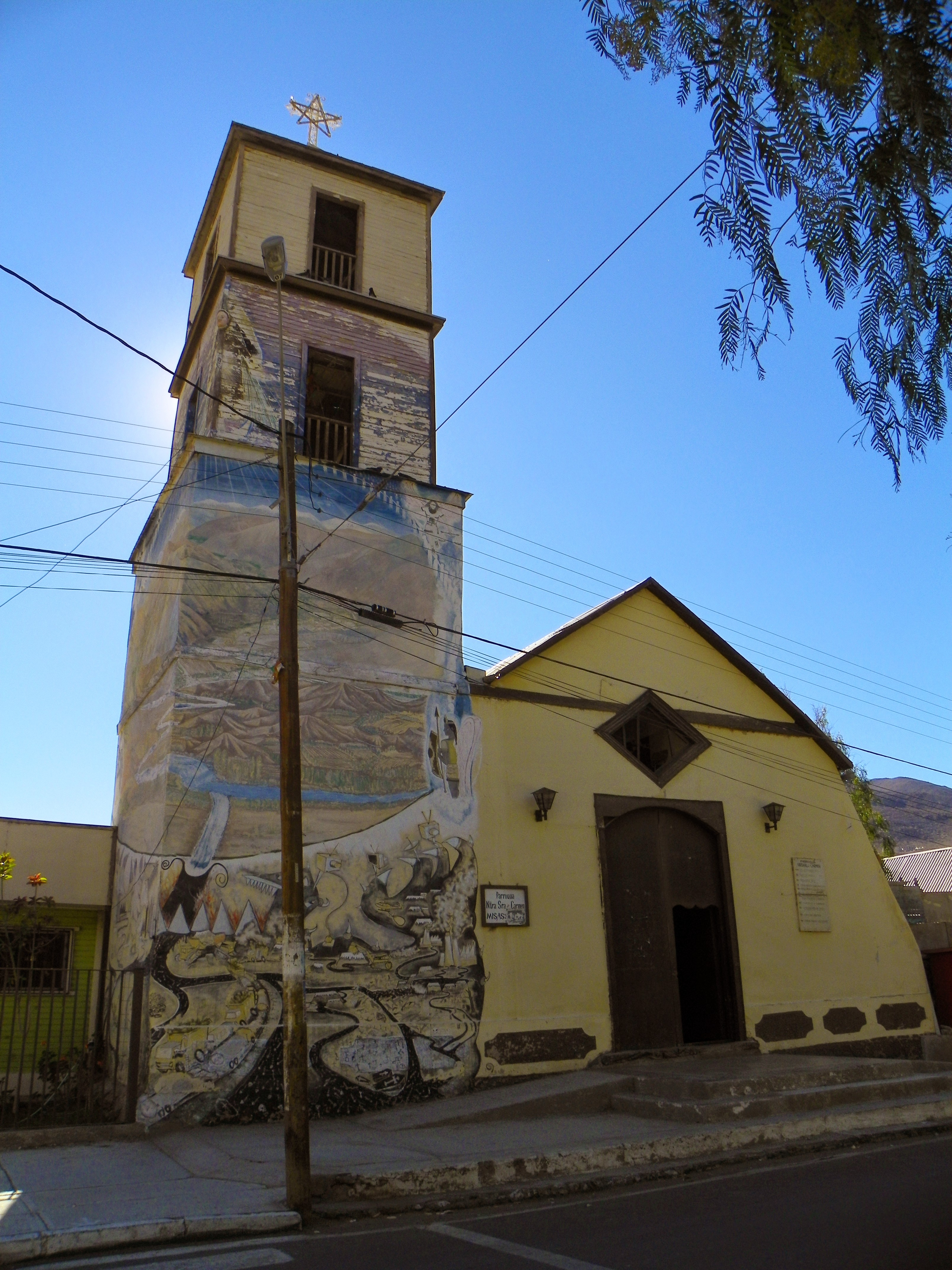 Alto Del Carmen, Chile